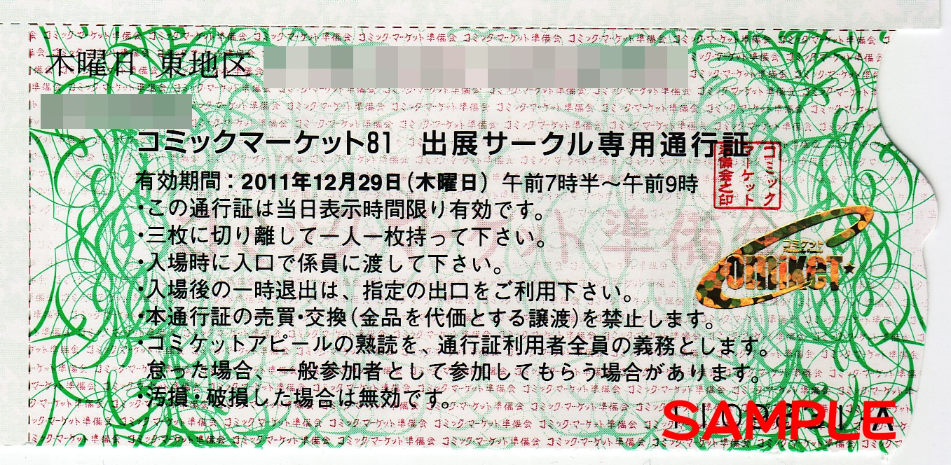 コミックマーケット81のサークル参加者に送付される出展サークル専用通行証のサンプル